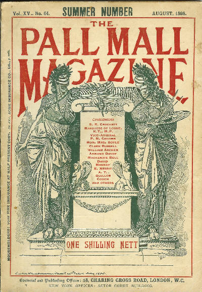 couverture de Pall Mall Magazine